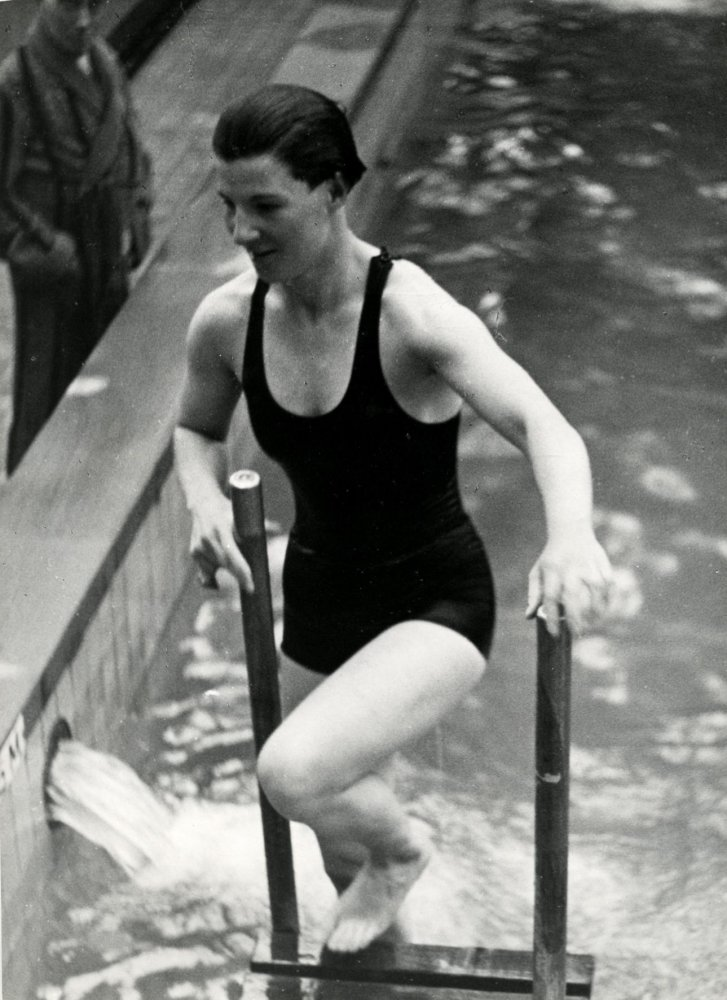 De Nederlandse zwemster Tini Wagner (1919) en kampioene op de Zomerspelen in Berlijn, komt net het zwembad uit. Zonder plaats, 1936.